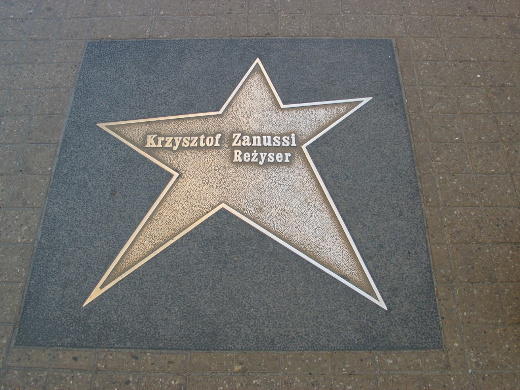 Łódź Walk of Fame - Krzysztof Zanussi